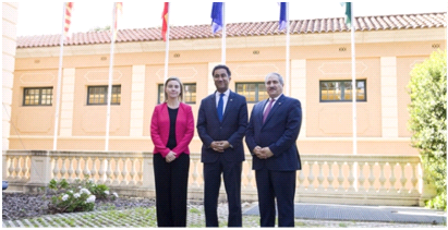 Fathallah Sijilmassi, devant le siège de l'UpM